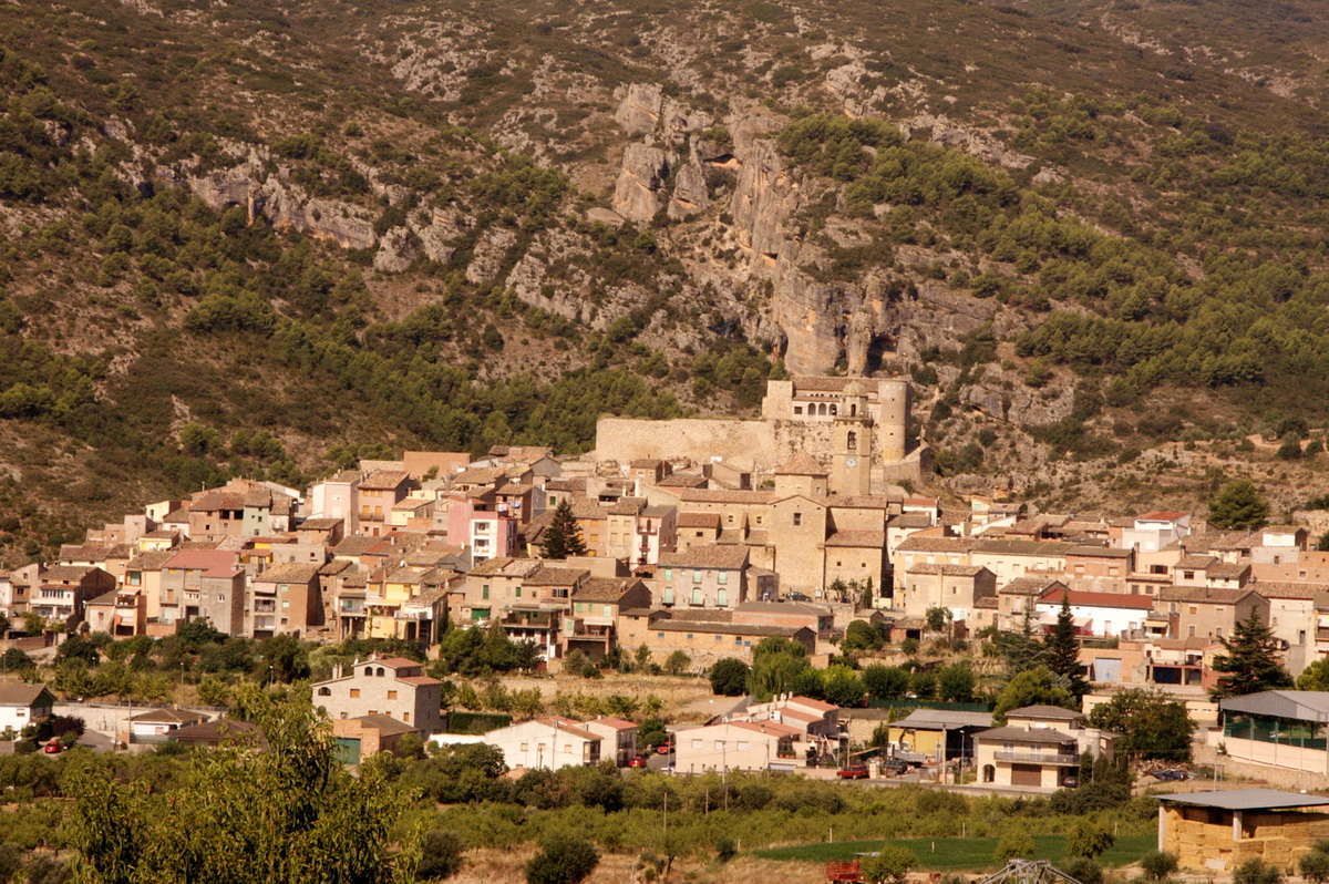 Os de Balaguer (la Noguera-Catalunya)